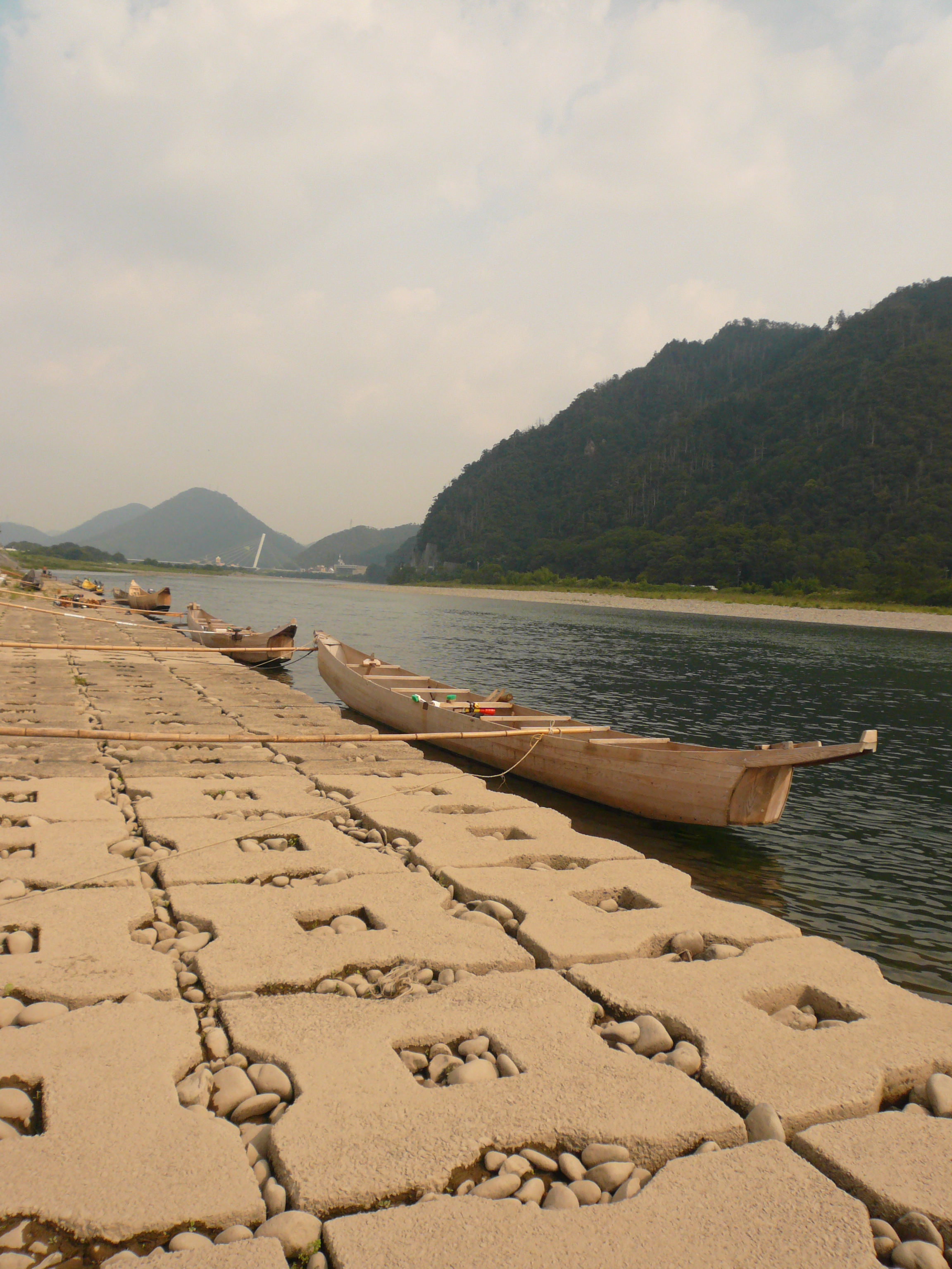 Ukai Nagaragawa（長良川鵜飼）,Gifu,Gifu(岐阜県岐阜市)で撮影。鵜舟。